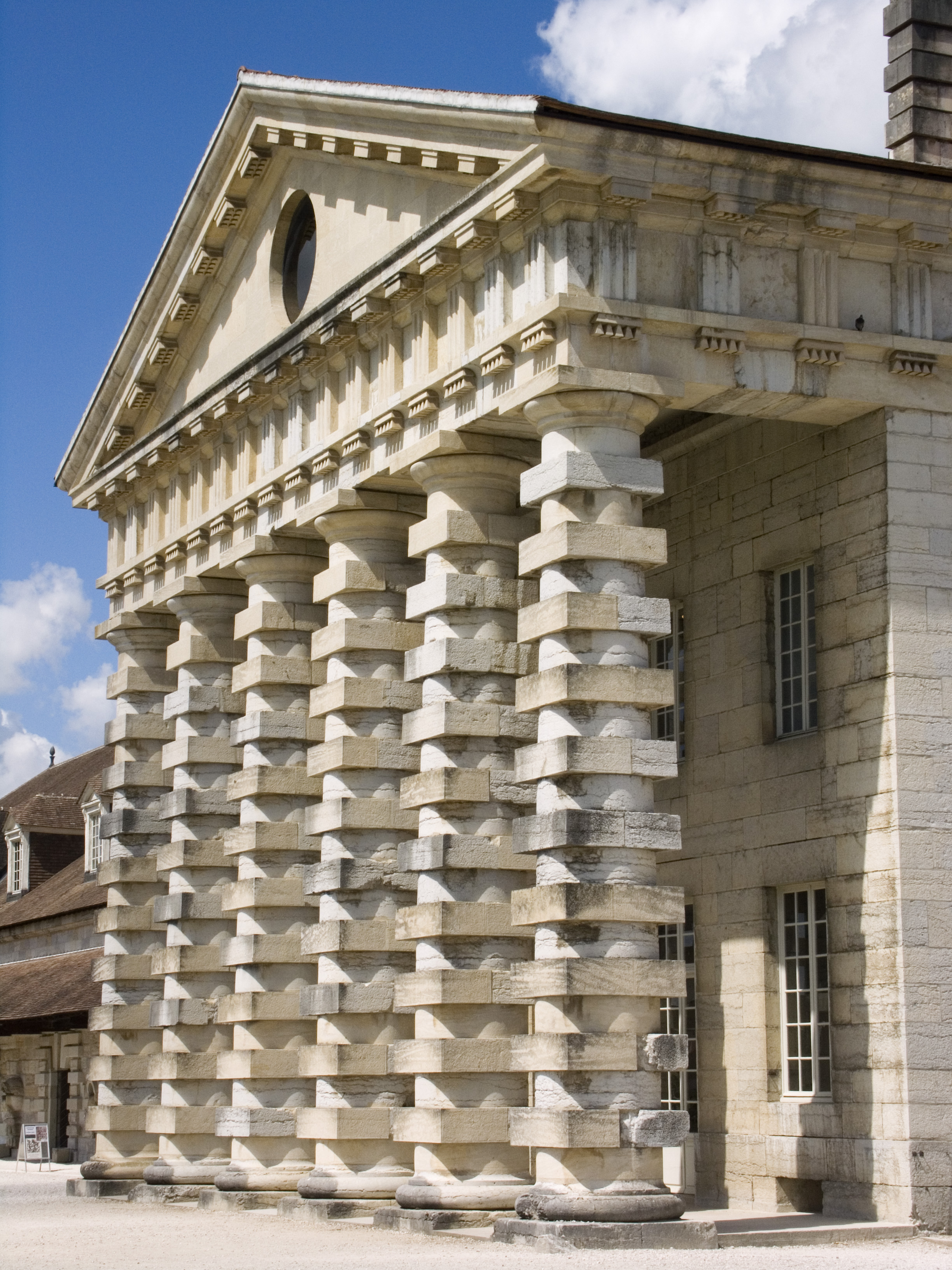 Portail de la maison du Directeur des Salines Royales d'Arc et Senan